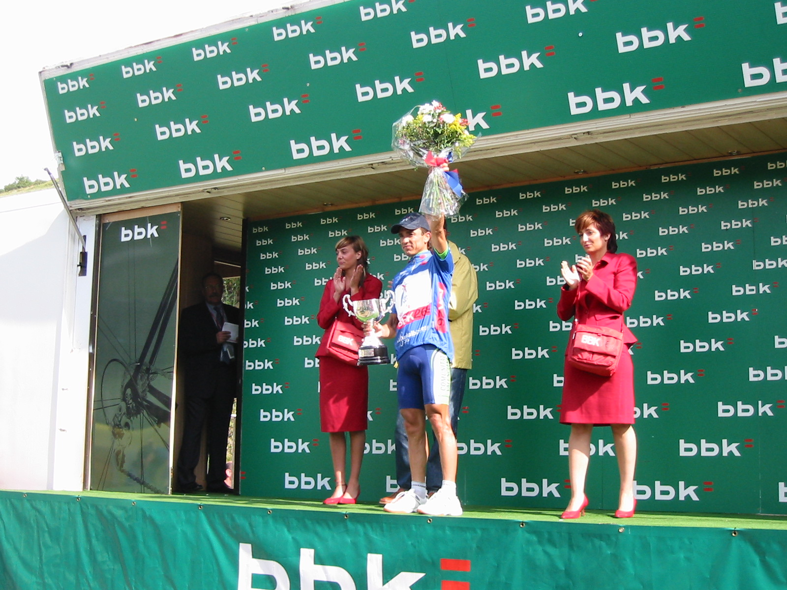 Eladio JIMENEZ (Comunidad Valenciana) Lider de la General. - Eladio JIMENEZ (Comunidad Valenciana) Sailkapen orokorraren liderra. Winner Euskal Bizikleta 2005